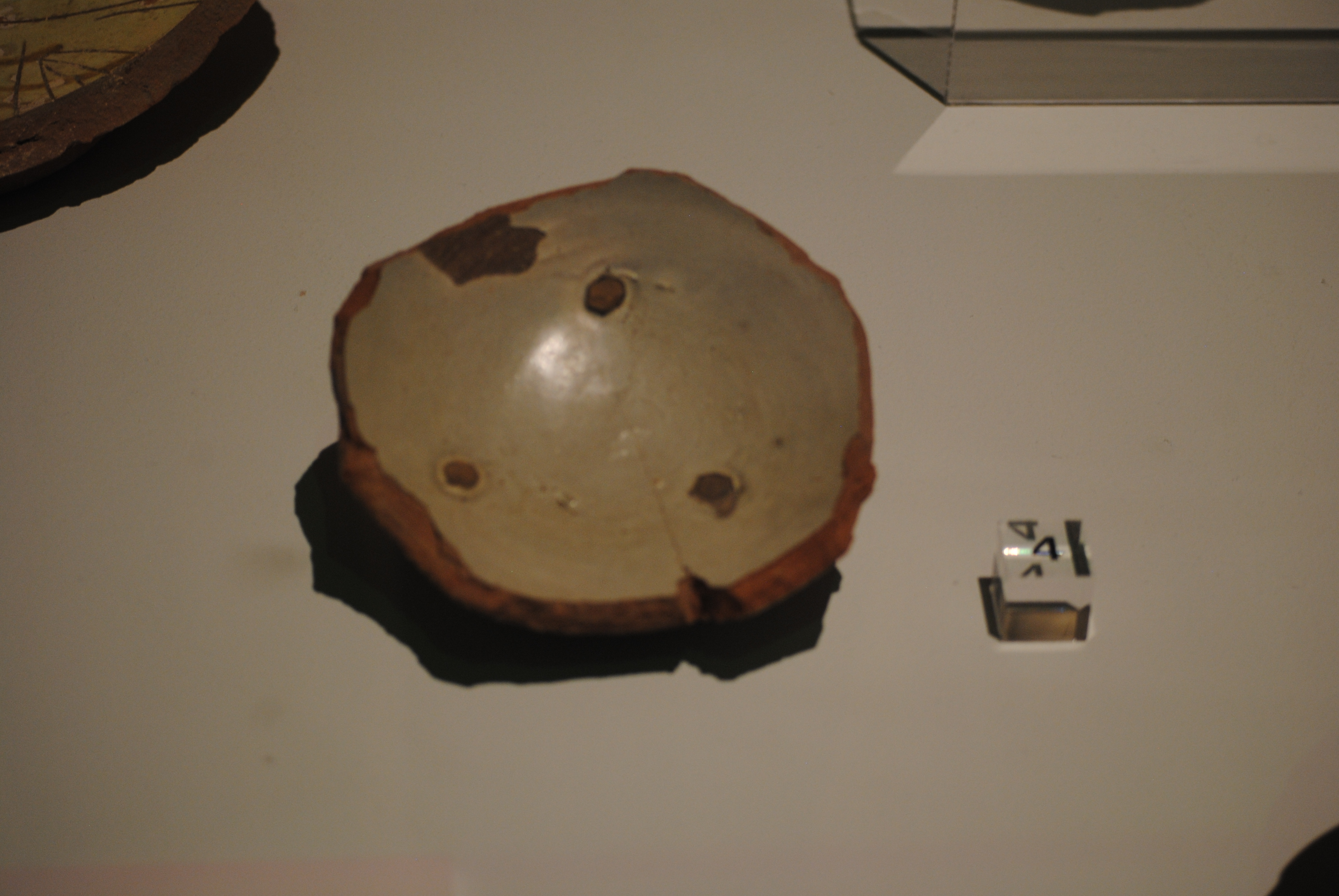 Ciotola in maiolica arcaica di Pisa, scarto di seconda cottura, prodotta intorno al 1530 - 1560 (recupero dallo scavo di villa Quercioli, Pisa) - Museo nazionale di San Matteo.